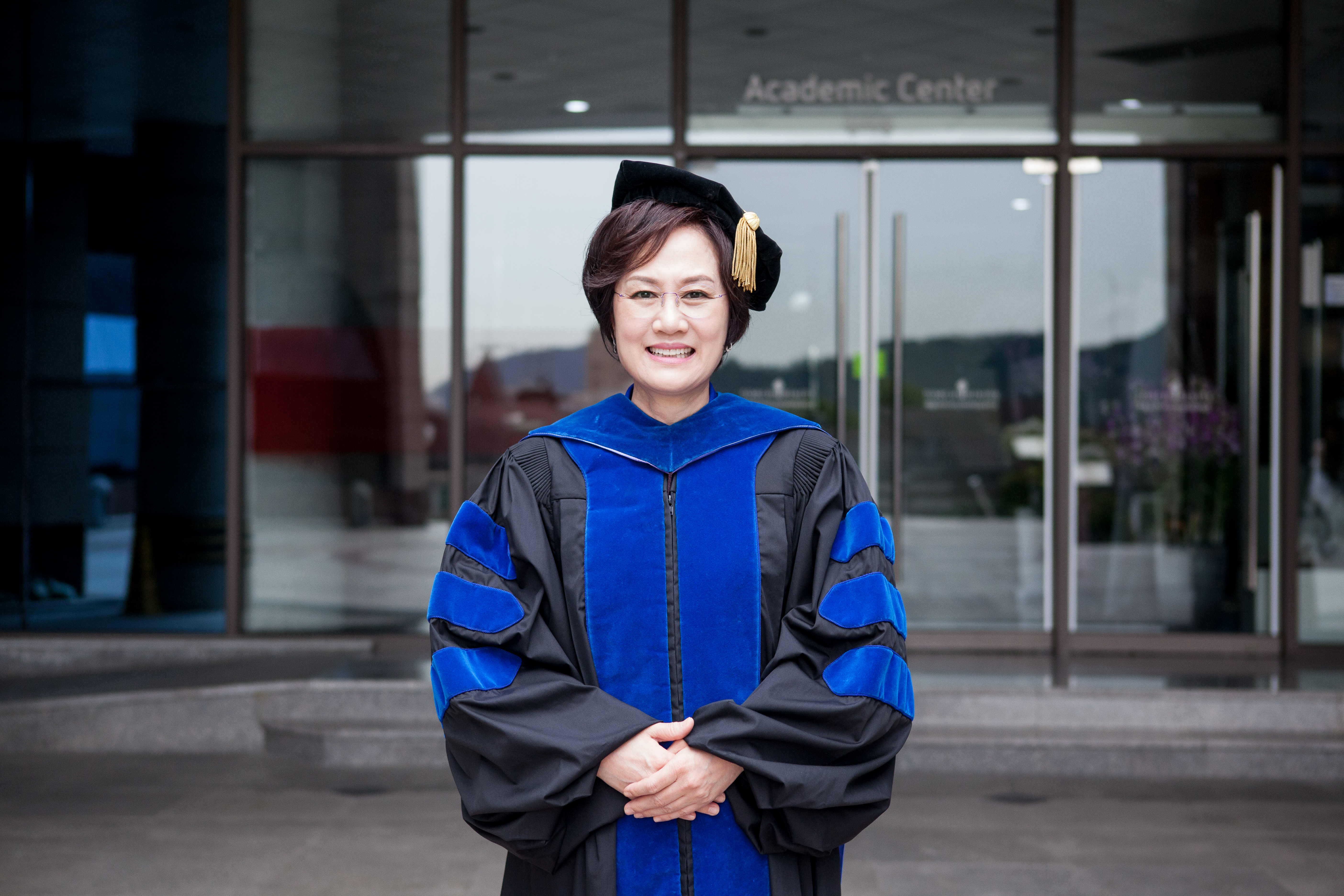 김윤희 총장 2019년 횃불트리니티신학대학원대학교 촬영